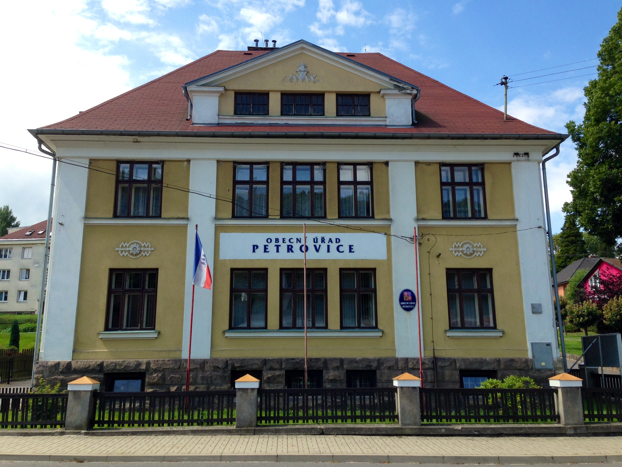 Obecní úřad v Petrovicích, okres Ústí nad Labem